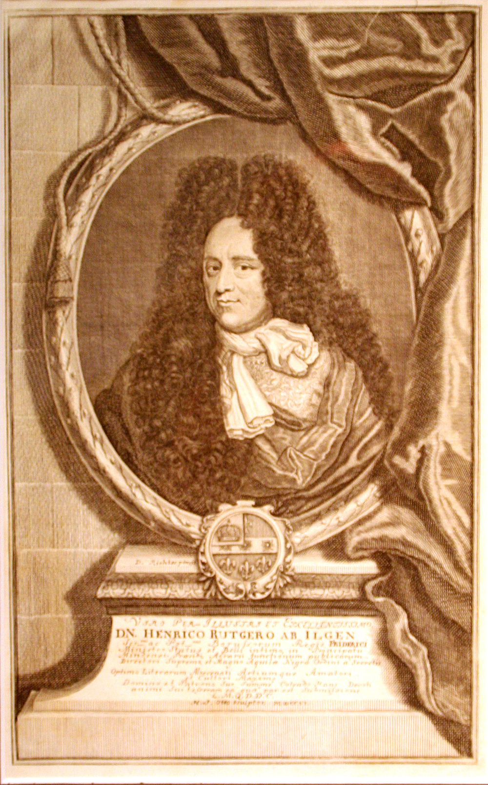 Heinrich Rüdiger von Ilgen, Kupferstich H. J. Otto nach D. Richter